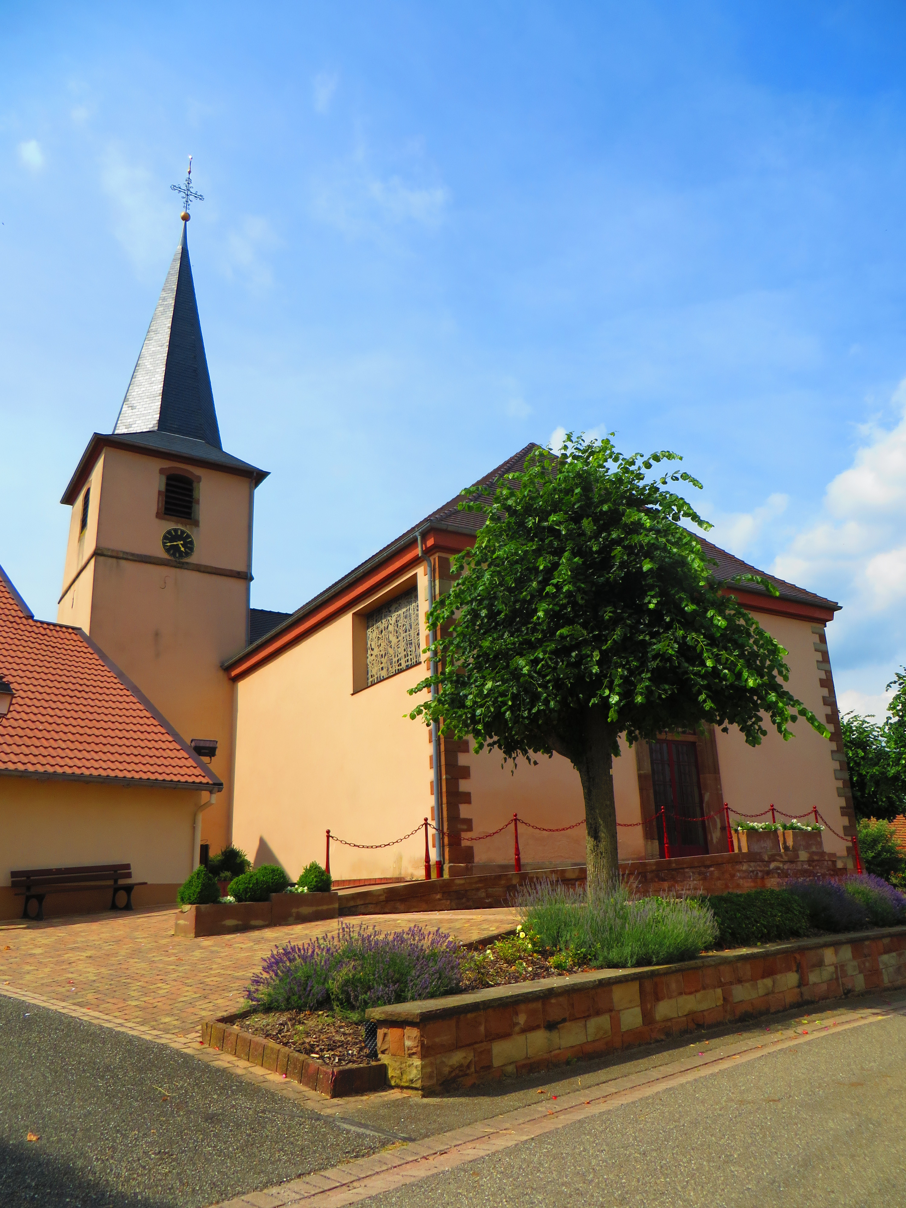 Baerendorf Église Saint-Rémy